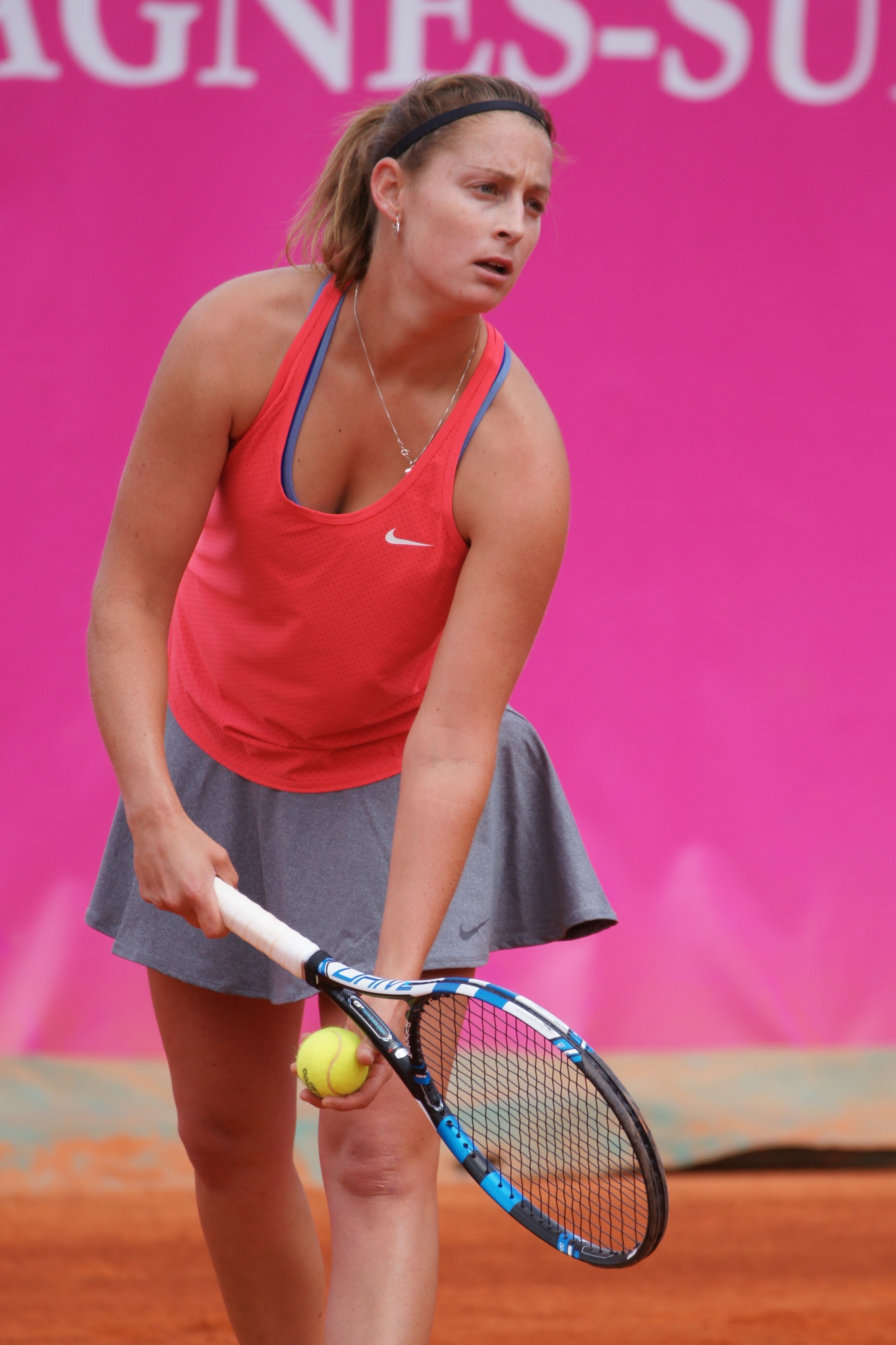 Yvonne Cavalle-Reimers Open ITF Cagnes 2016